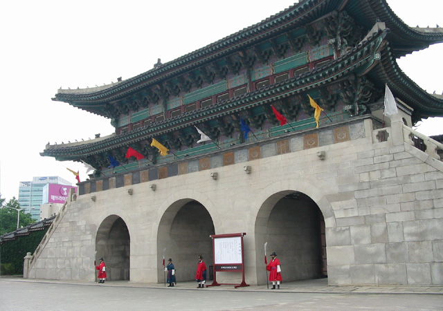 Gwanghwamun in Gyeongbokgung, Seoul.